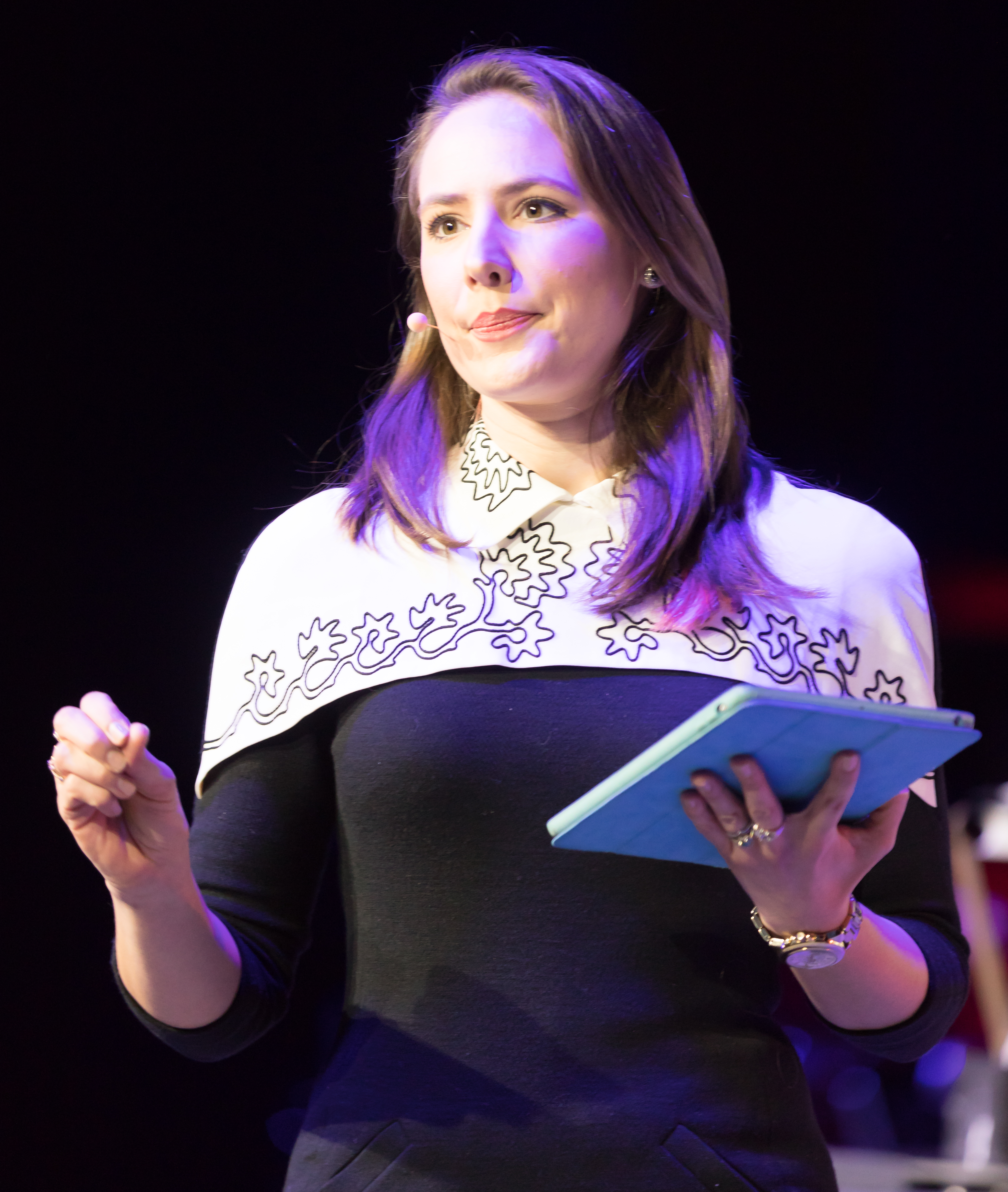 Belle Donati moderiert die Preisverleihung zum Auto des Jahres 2018